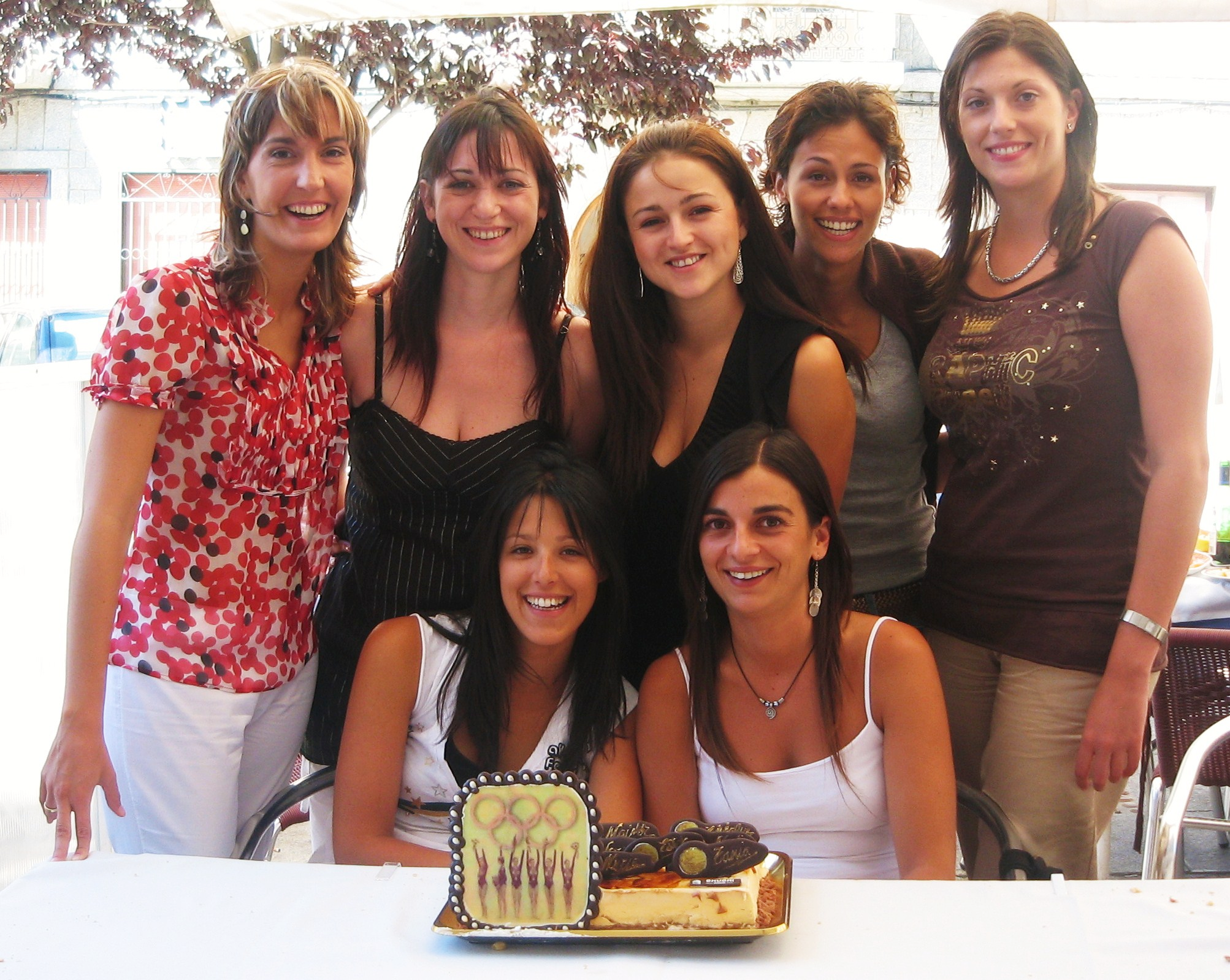 Imagen promocional del documental Las Niñas de Oro con las integrantes del conjunto español de gimnasia rítmica de 1996, en su reencuentro el 12 de agosto de 2006 en Ávila para el rodaje de dicho documental con motivo del décimo aniversario de la medalla de oro olímpica en Atlanta. De pie, de izquierda a derecha: Maider Esparza, Estíbaliz Martínez, Nuria Cabanillas, Estela Giménez y Lorena Guréndez. Sentadas: Tania Lamarca y Marta Baldó.